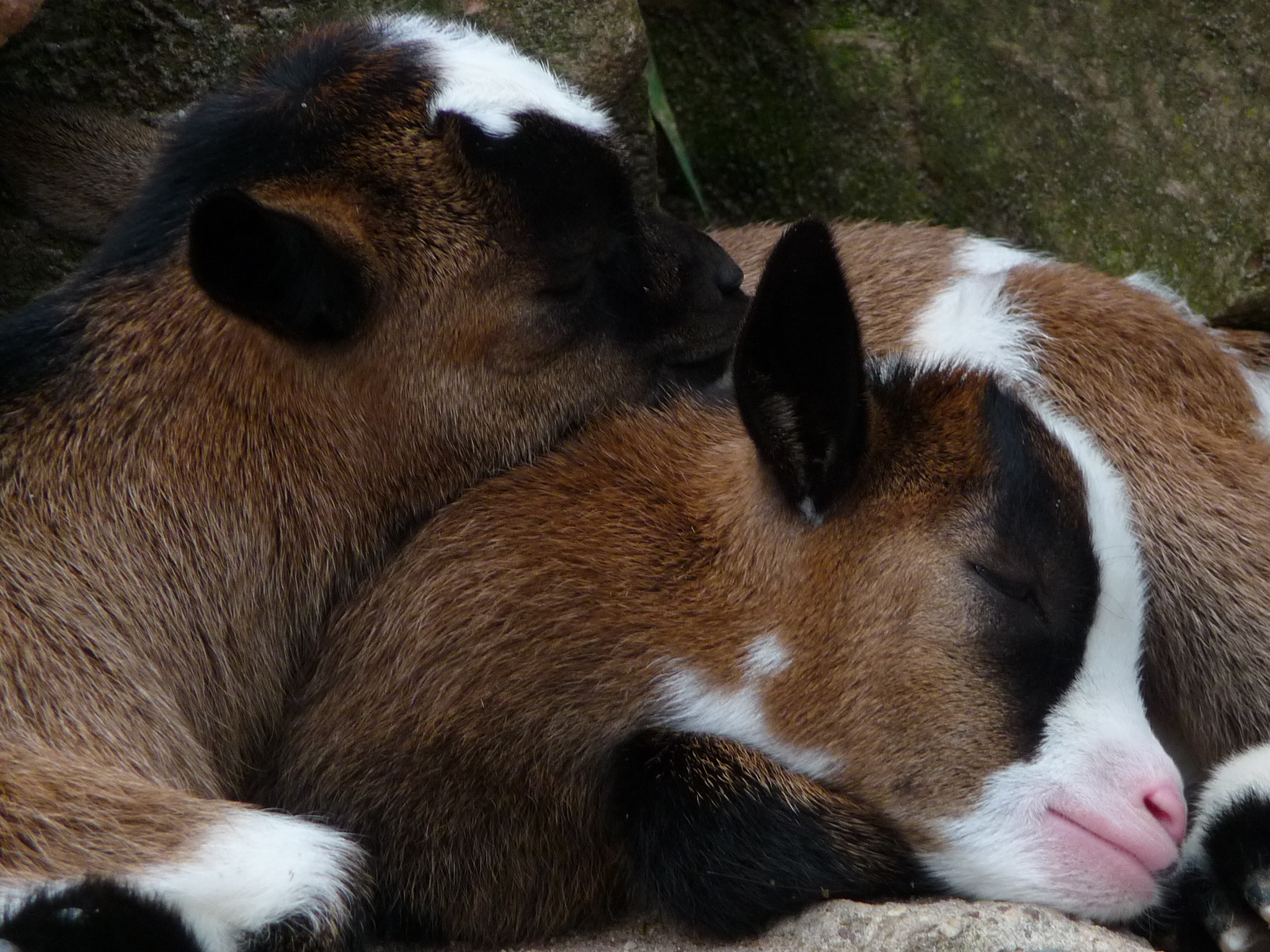 Afrikanische Zwergziegen, Jungtiere im Alter von circa 2 Monaten (Capra hircus)